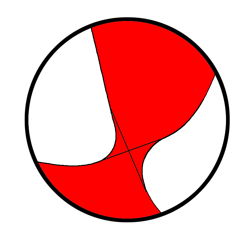 2017ko martxoaren 10eko Iruñerriko lurrikararen foku mekanismoa